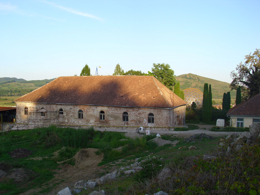 Cladire Anexa - Grajd ?